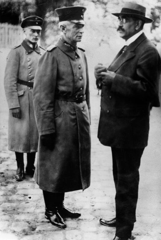 Gustav Noske und Walter Lüttwitz ADN-ZB/Archiv Deutschland (Weimarer Republik): Der sozialdemokratische Reichswehrminister Gustav Noske - er hatte diese Funktion von 1919 bis März 1920 inne - im Gespräch mit General von Lüttwitz. (Aufn.: um 1920) II.Text: Rechts: Gustav Noske, geb. 1868 soz.dem. politiker, erster Reichswehrminister von 1919 bis März 1920. Links: General Walter v. Lüttwitz, geb. 1859. Abgebildete Personen: Noske, Gustav: Reichswehrminister, Oberpräsident von Hannover, SPD, Deutschland Lüttwitz, Walter von Freiherr: General der Infanterie, kaiserliches Heer, Deutschland